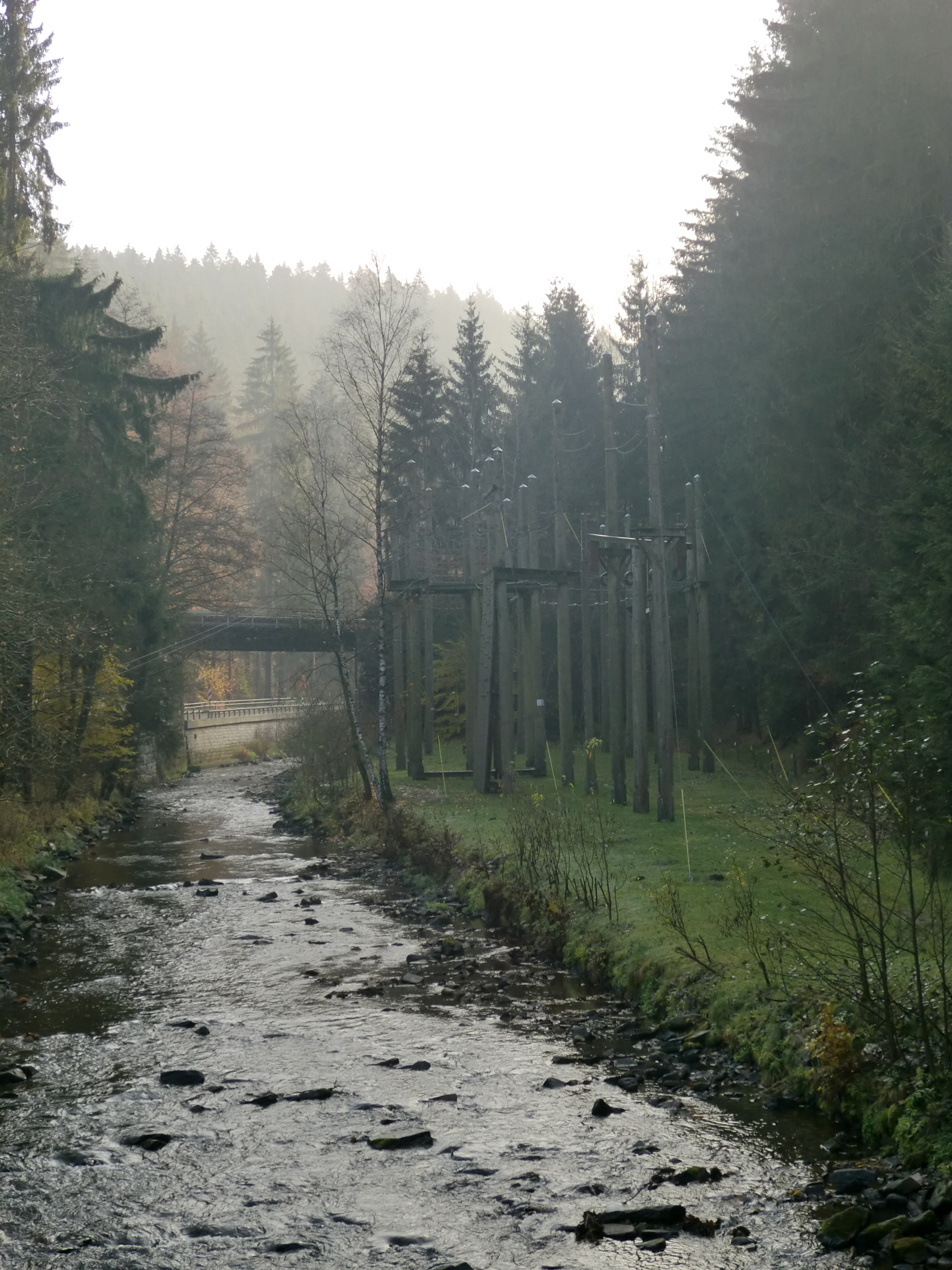 Hochseilgarten nahe der Strobelmühle und Schwarze Pockau